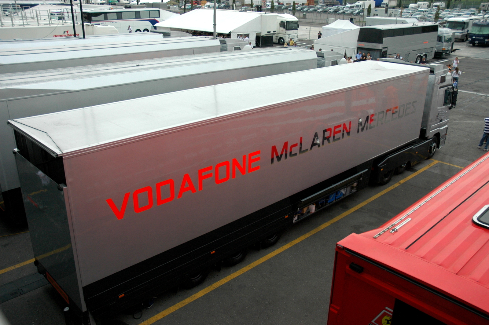 Mclaren Mercedes truck at Monza 2007